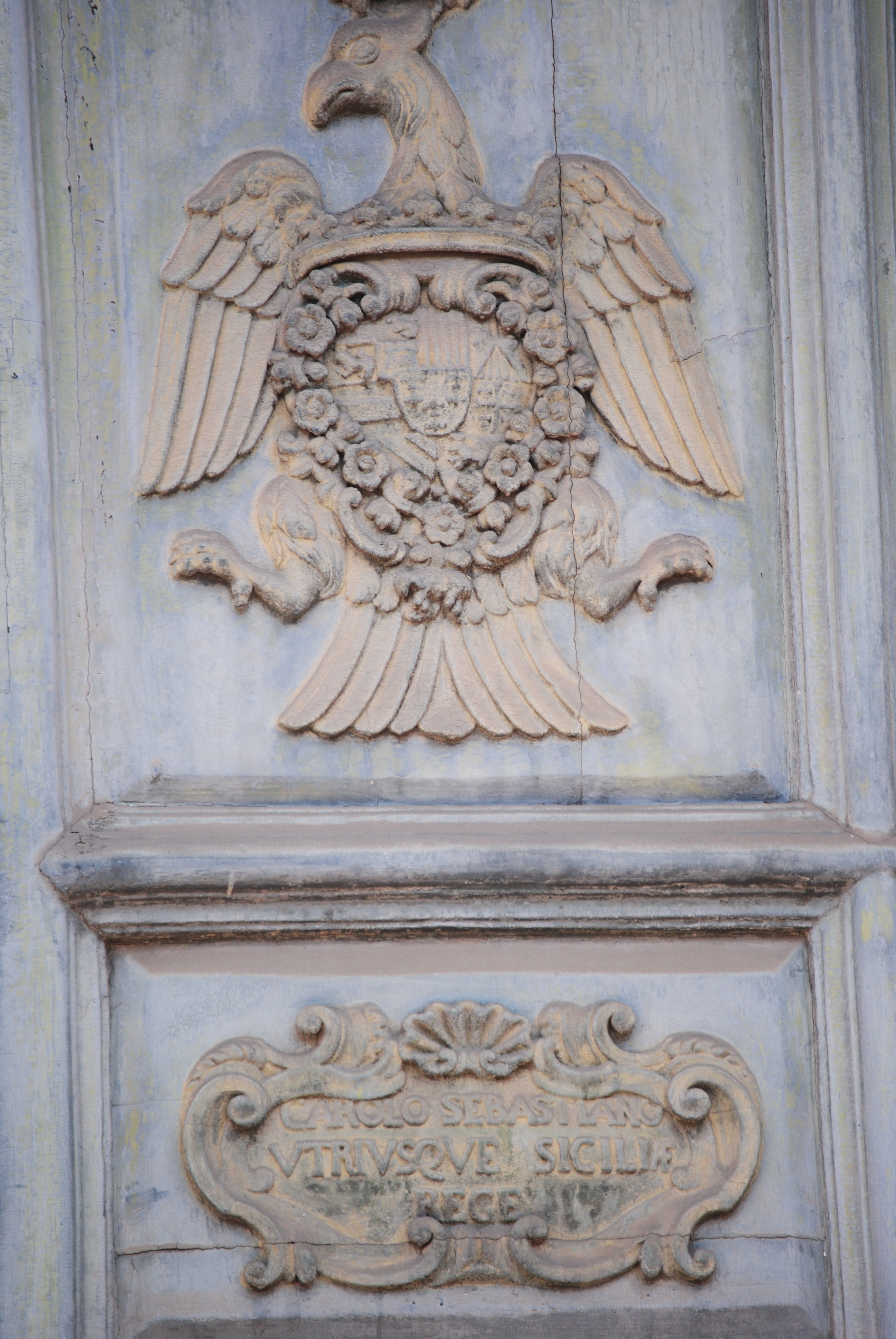 Scudo di Carlo III, re di Napoli e di Sicilia, per il Regno di Sicilia su una formella del portone del Duomo di Catania (1736). In basso la legenda CAROLO SEBASTIANO/ VTRIVSQVE SICILIÆ/ REGE (Carlo Sebastiano, Re della Sicilia Ulteriore)